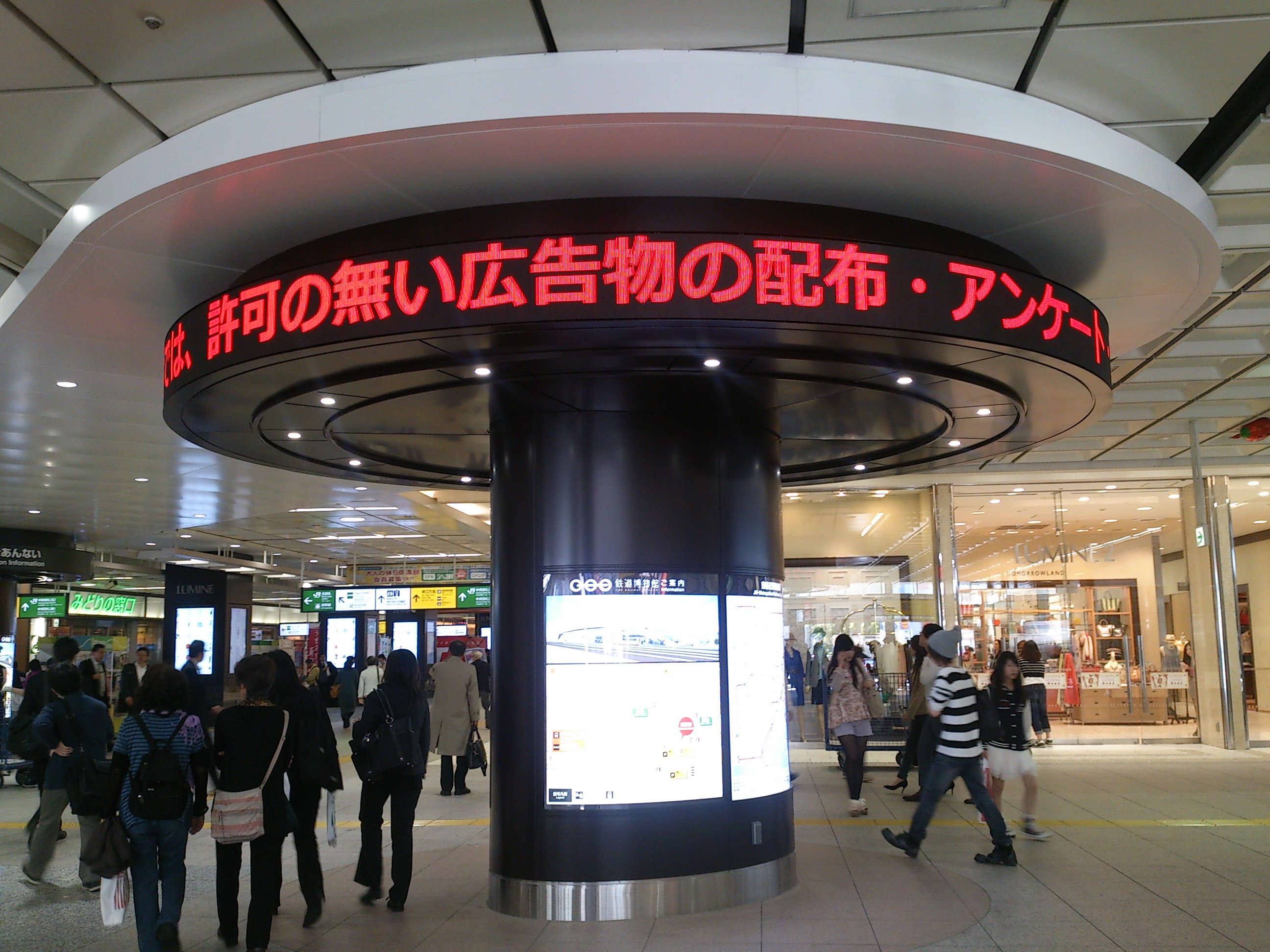 熊谷駅のそれとはずい分違うね。